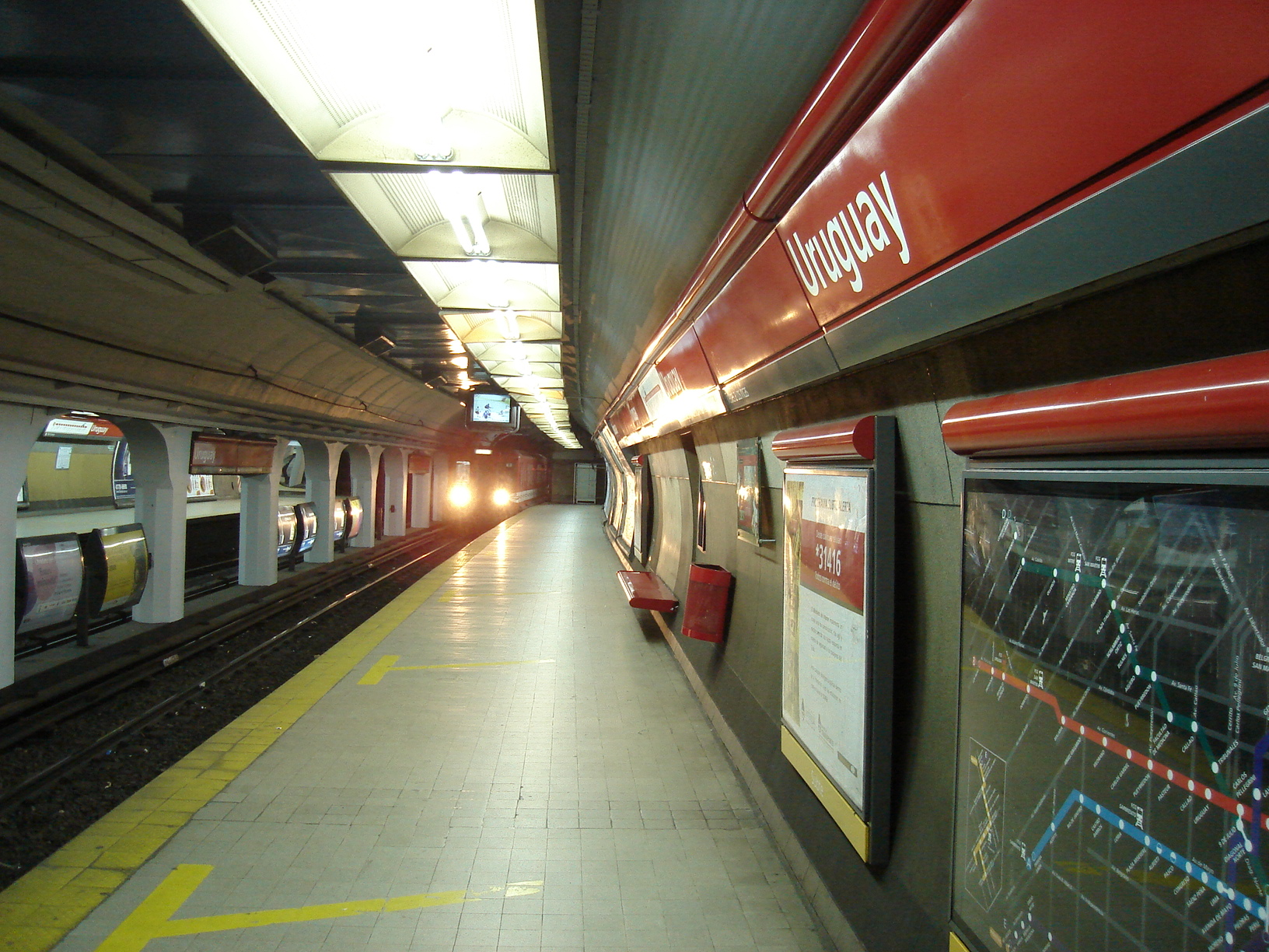 Anden a Los Incas/Parque Chas de la estación Uruguay de la linea B de subtes de Buenos Aires, Argentina.